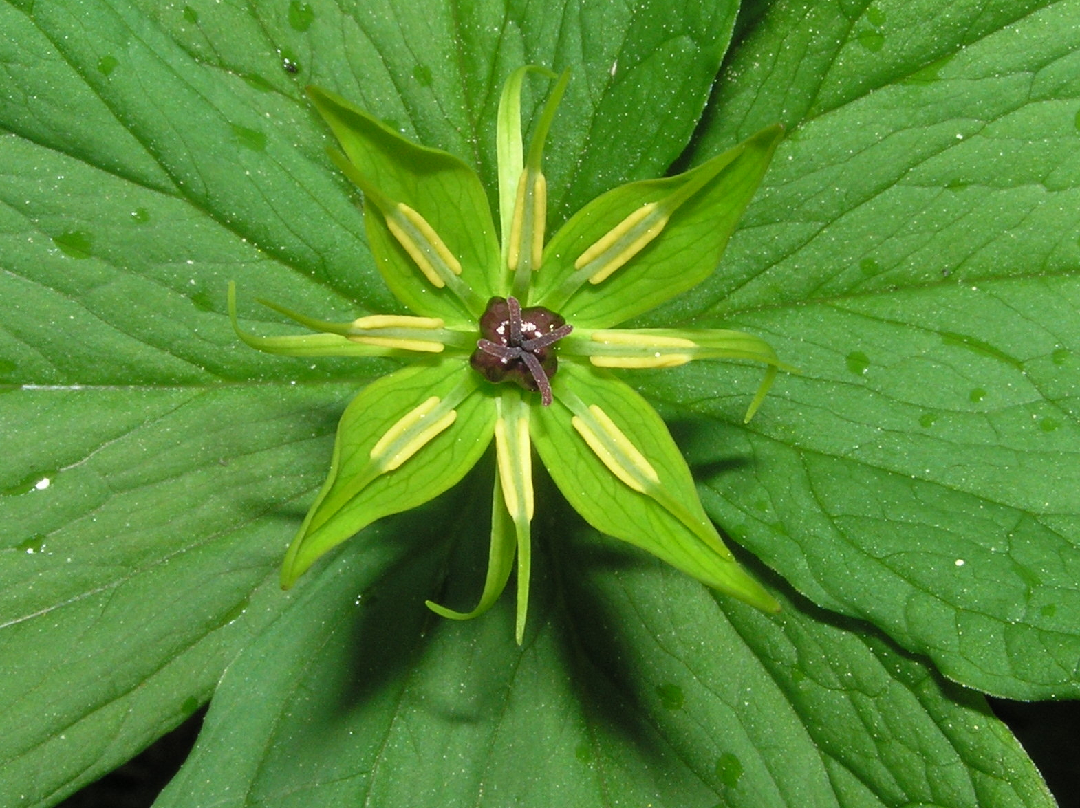 Paris quadrifolia, Czworolist pospolity, Białowieża, Polska